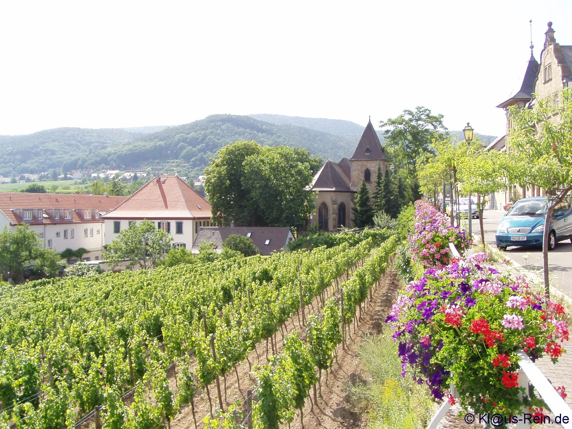 Bildbeschreibung: Nikolauskirche (Gimmeldingen) aus Nordosten Fotograf/Zeichner: Klaus Rein, 67435 Neustadt an der Weinstraße-Mußbach, Johann-Gottlieb-Fichte-Str. 29 Datum: 2005 Sonstiges: GNU-Freigabe für Wikipedia gem. persönlicher Mail von Klaus Rein an Benutzer:Mundartpoet vom 16. März 2006